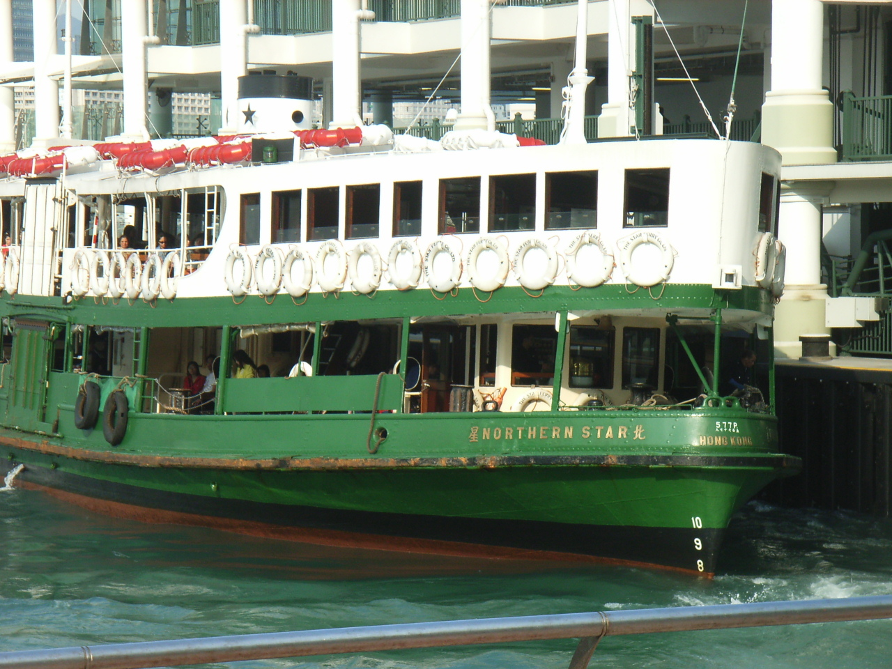 天星小輪 (Star Ferry)，(zh:1898年zh:5月1日至今)是zh:香港歷史悠久及著名的zh:渡海小輪公司，在zh:維多利亞港兩岸提供服務，載客來往zh:香港島及zh:九龍半島。 新建船隊之一: 北星 (第3代) NORTHERN STAR (III)(1959-). Photo created by User:HungBEER.